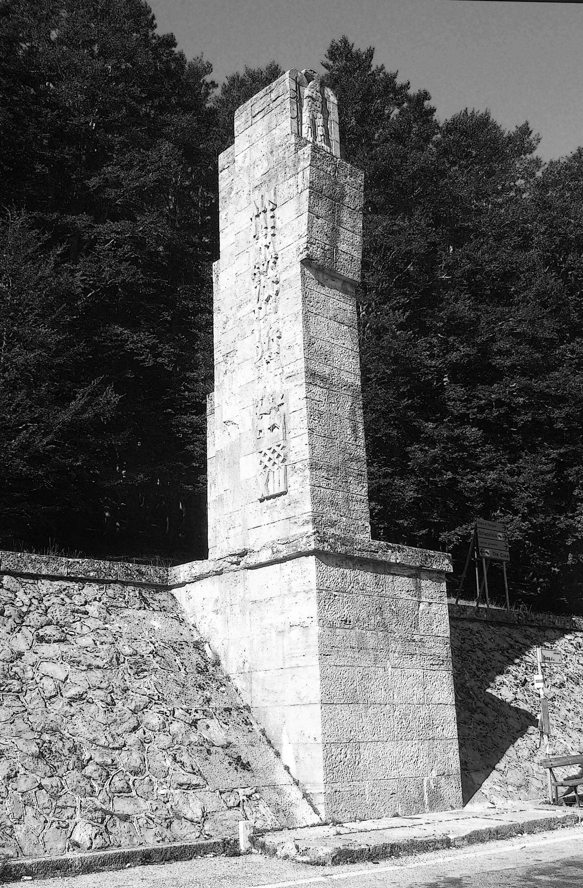 Erma ai "caduti della rivoluzione fascista" nel piazzale di Campoforogna - Monte Terminillo, provincia di Rieti, Lazio